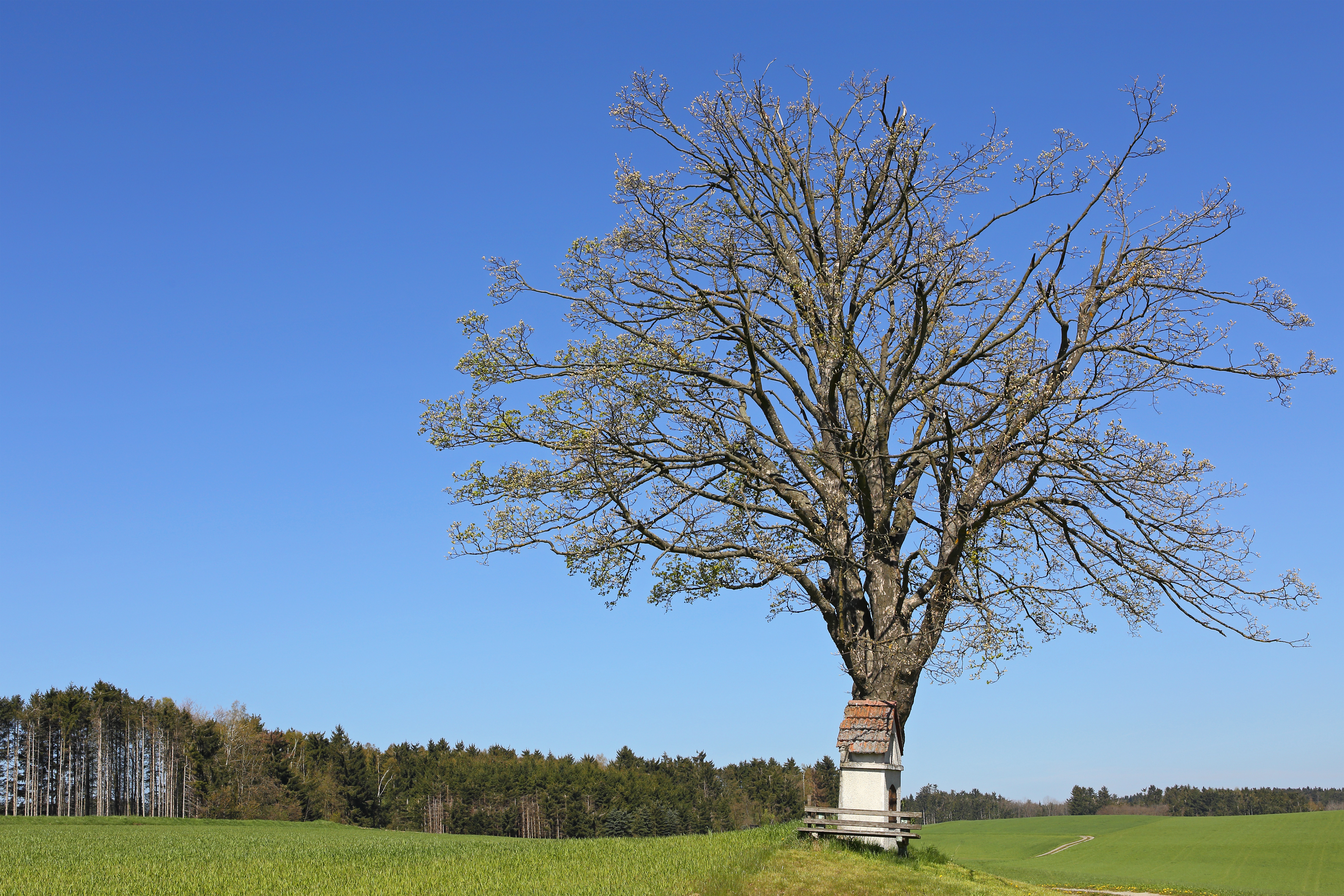 Auf einem Hügel nördlich von Purk (Gemeinde Kottes-Purk) steht neben einem Marterl ein 1987 zum Naturdenkmal erklärter Feldahorn. This media shows the natural monument in Lower Austria with the ID ZT-152.